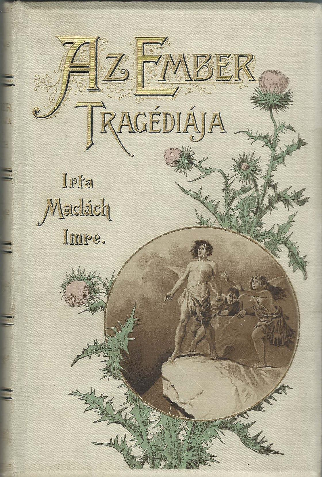 Madách Imre Az ember tragédiája című művének tizenegyedik, 1895-ös kiadása.